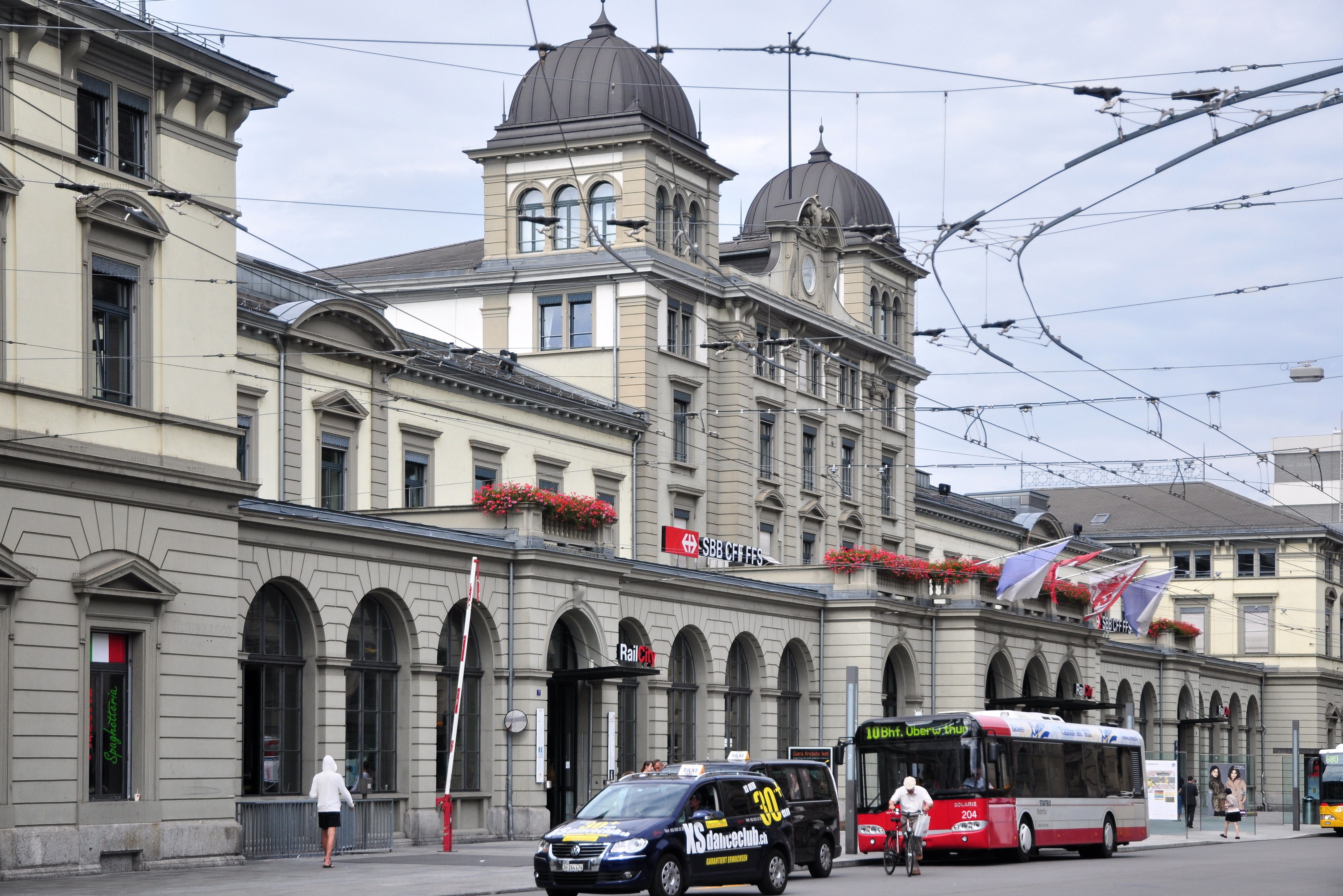 Hauptbahnhof Winterthur, Bahnhofplatz 5–9 in Winterthur (Switzerland)